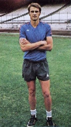 Aimé Jacquet en 1977 (O. lyonnais, entraîneur), 'Football 77', Panini figurina n°110.